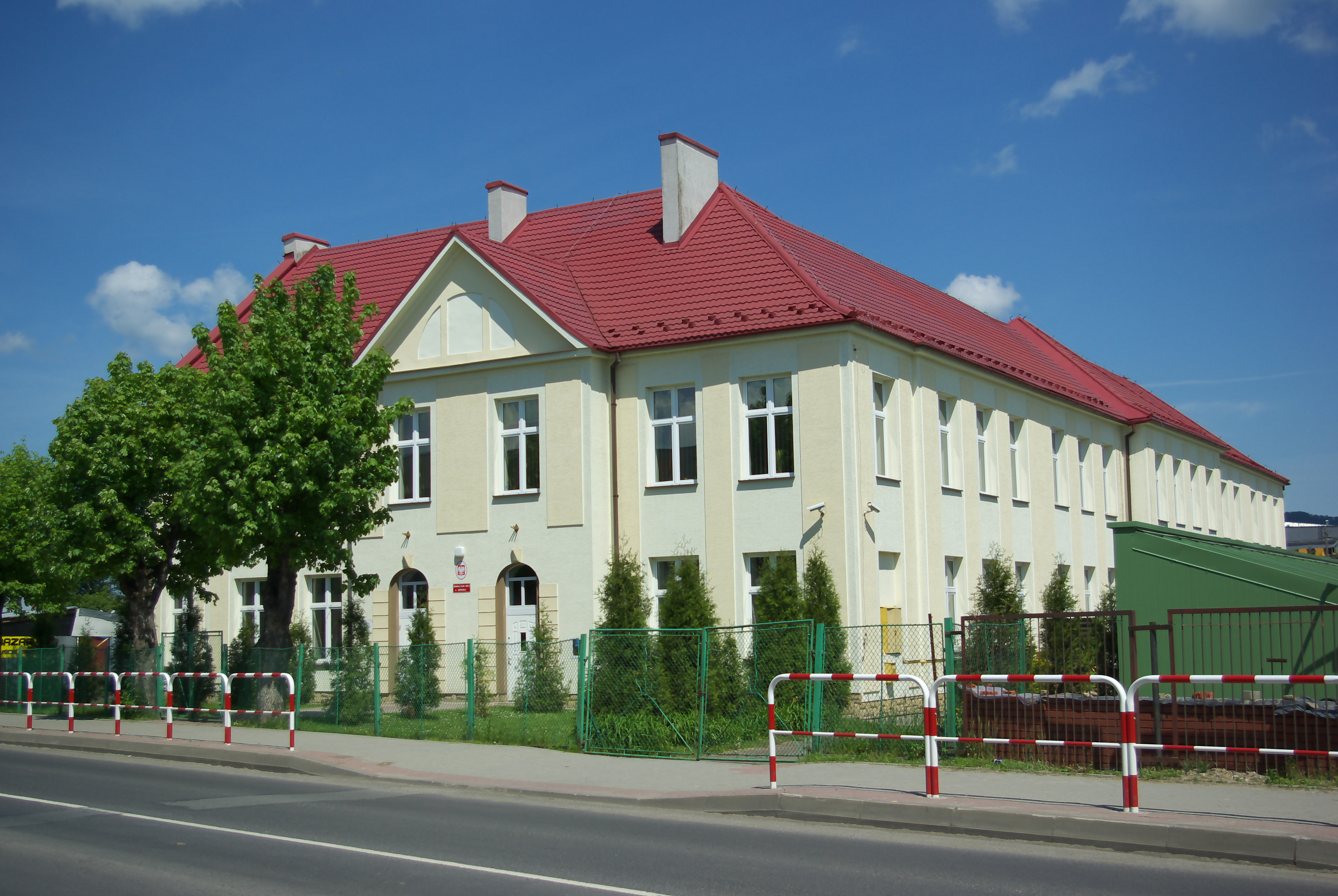 Gimnazjum nr 3 w Sanoku przy ulicy Kazimierza Lipińskiego 63 w Sanoku